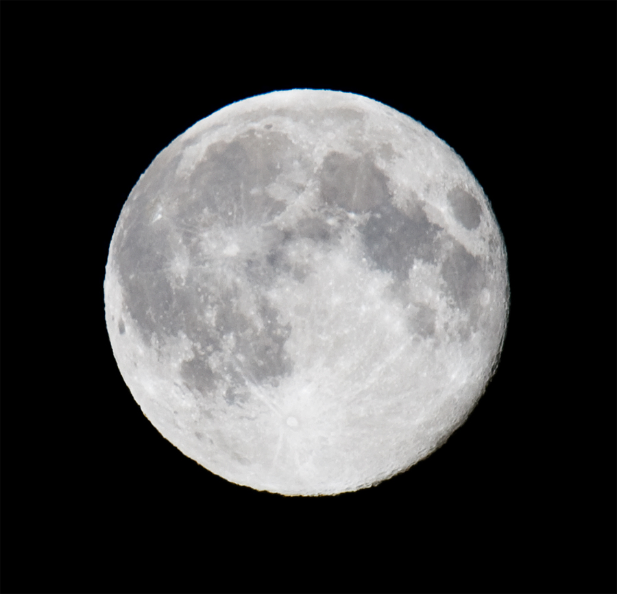 Full moon